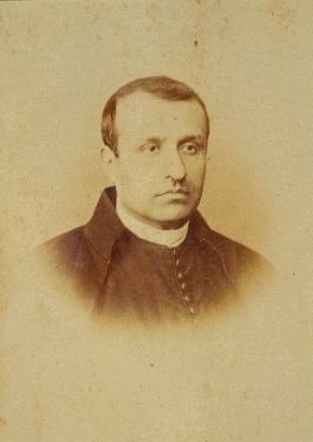 José Oliver y Hurtado, fotografía de J. Laurent. Museo de Historia de Madrid